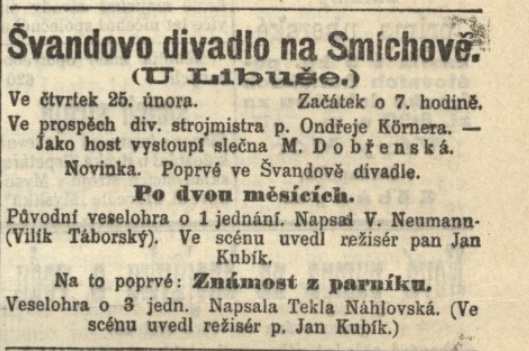 Inzerce v novinách